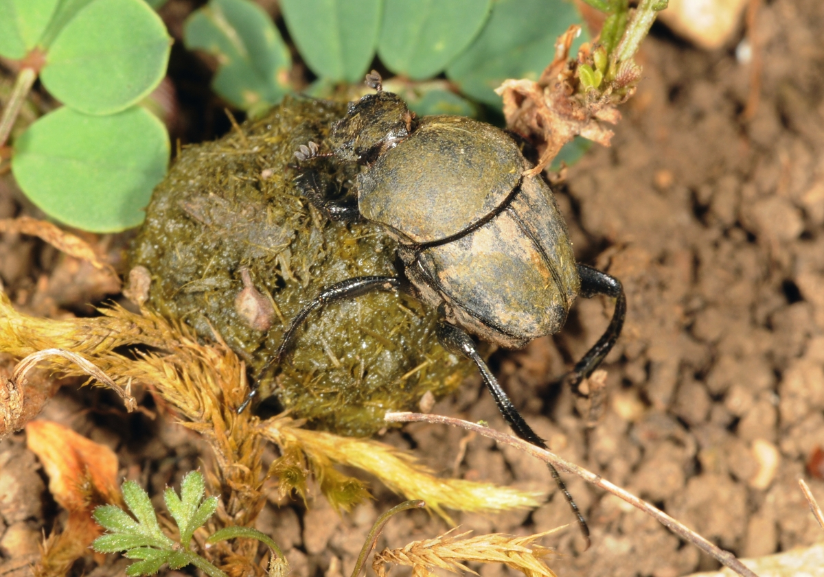 Sisyphus schaefferi an Schafskot, Steinau bei Schlüchtern, Main-Kinzig-Kreis, Hessen, Deutschland